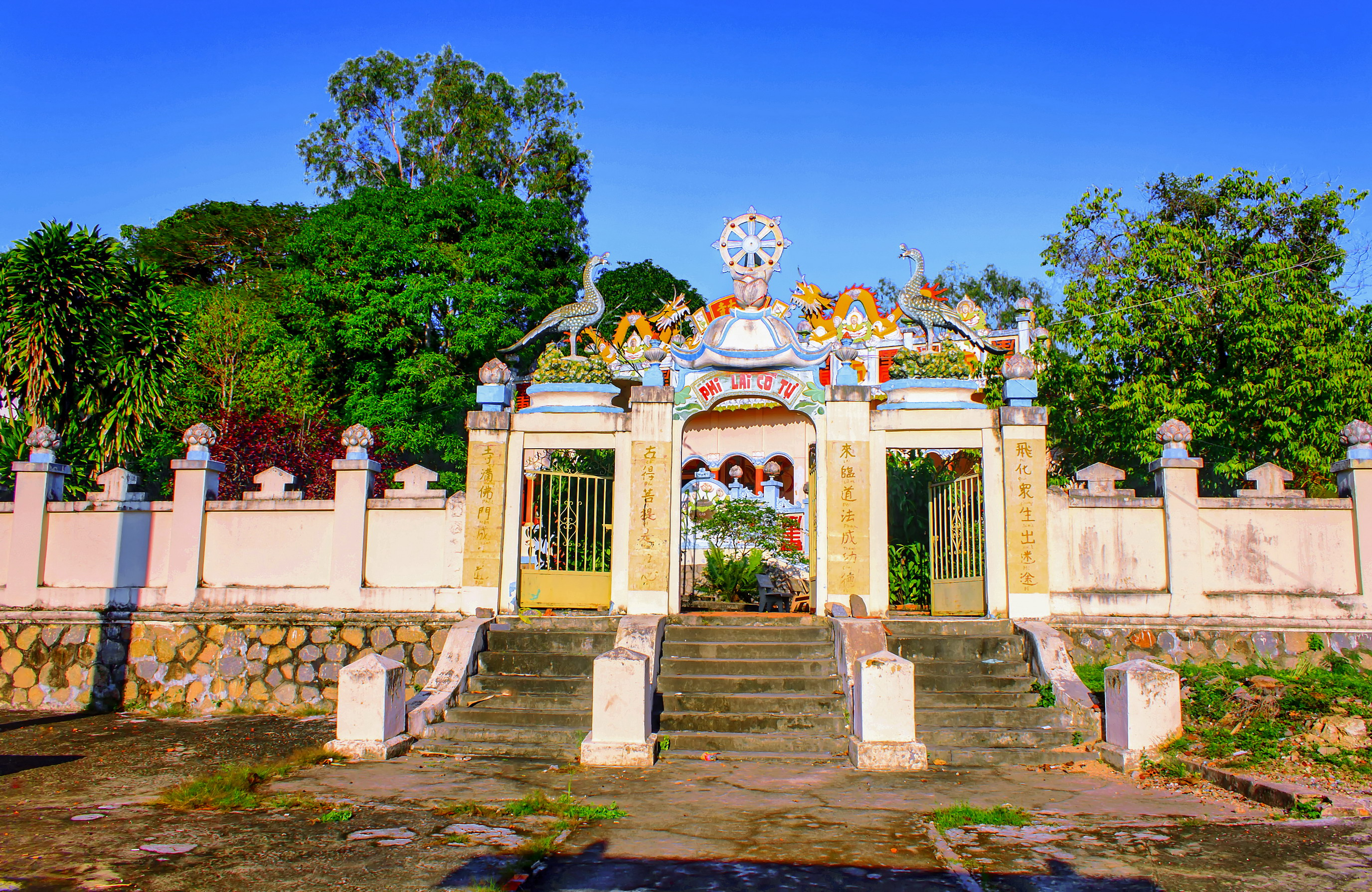 Chùa Phi Lai ở Núi Voi, thuộc huyện Tịnh Biên, An Giang, Việt Nam.